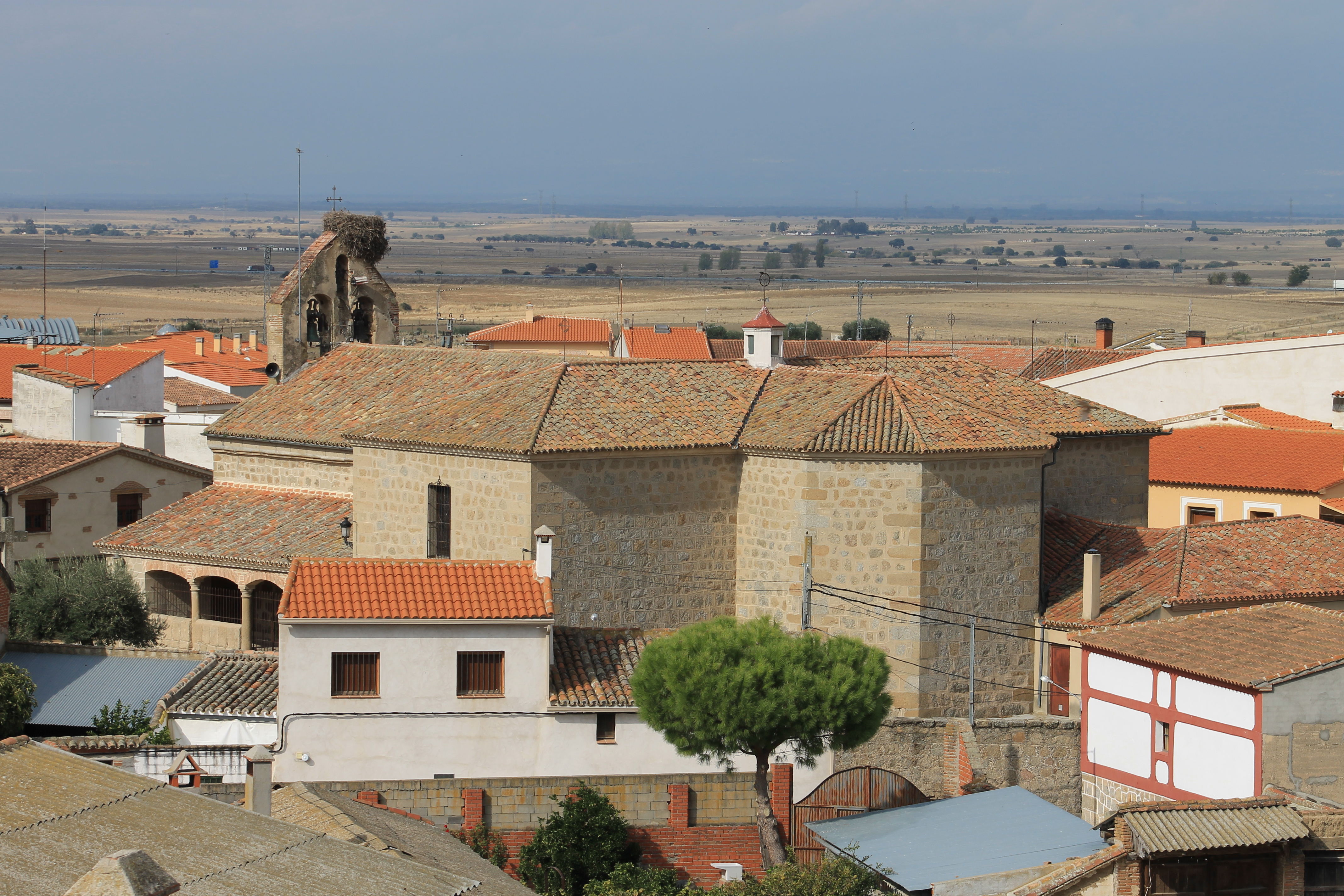 Iglesia Parroquial de San Ildefonso